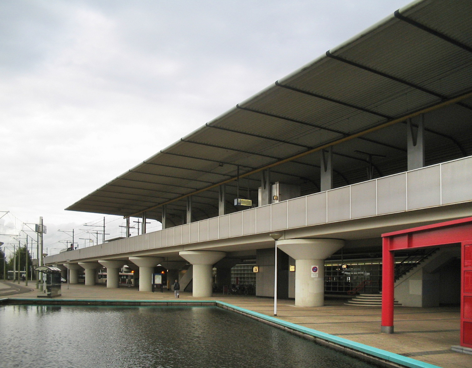 station Voorburg, 9 november 2005